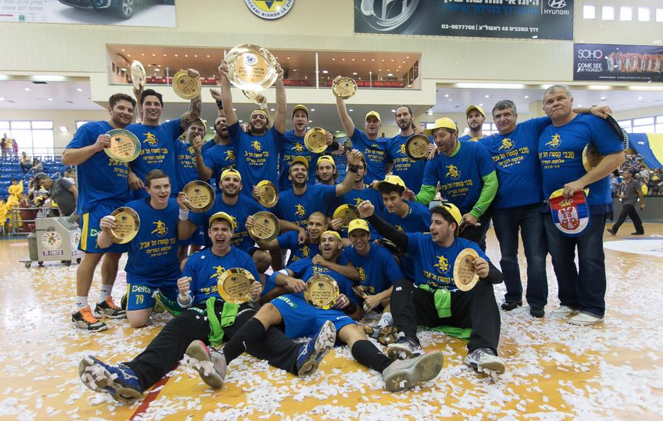 מכבי תל אביב כדוריד, אלופת המדינה לעונת 2016